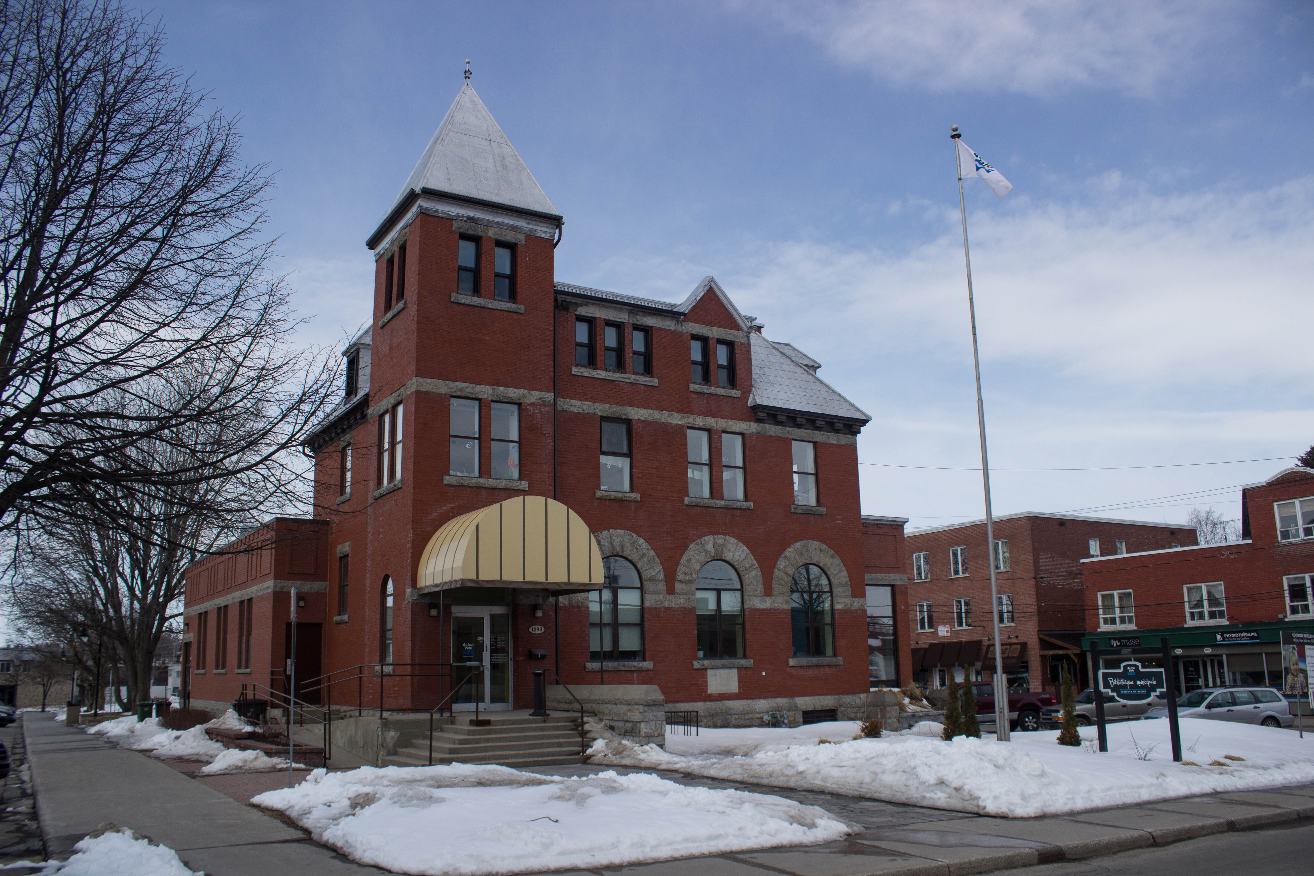 Bibliothèque municipale d'Acton Vale